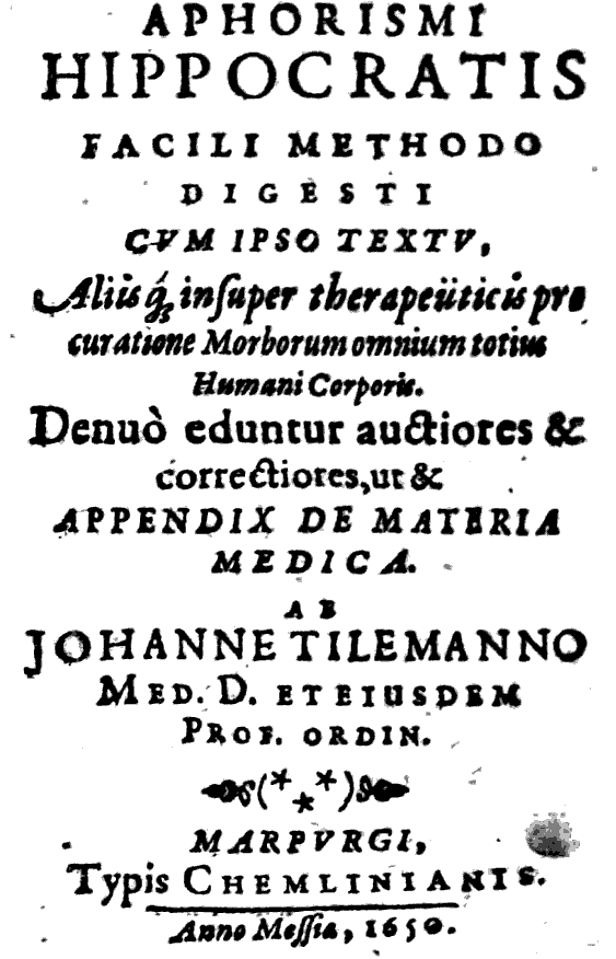 Johannes Tilemann, Medizinprofessor in Marburg, Titelblatt eines seiner Bücher, 1650